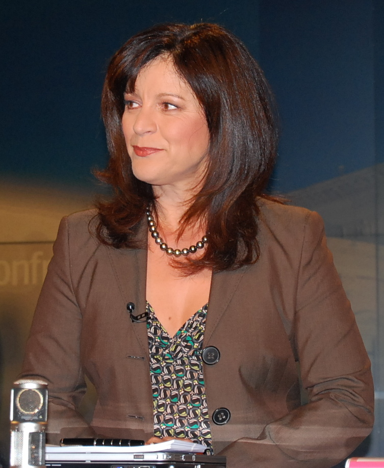 Ingrid Thurnher bei einem Wahlduell während der Nationalratswahl 2008